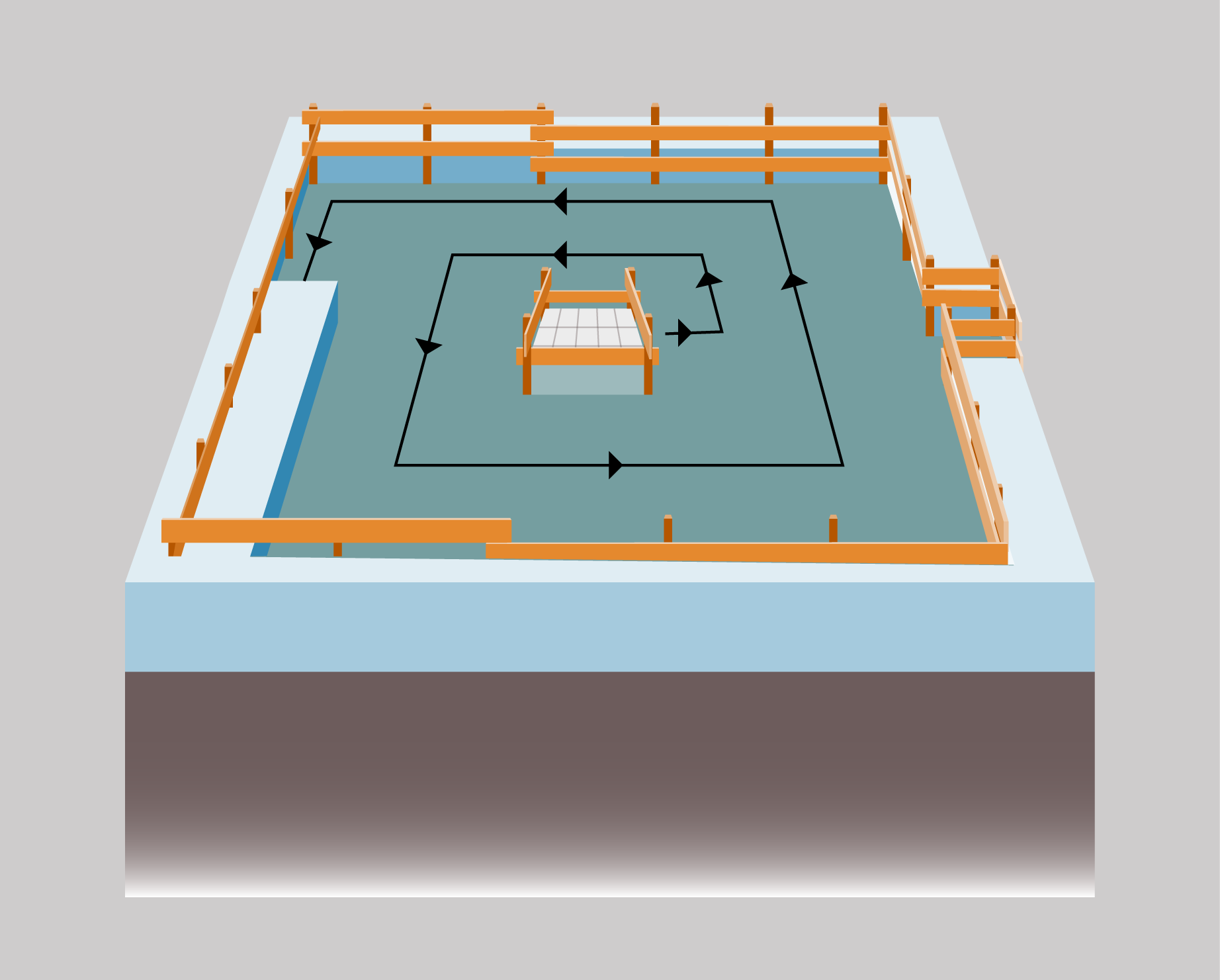 Méthode et sécurité dans le déneigement d'un toit en terrasse. On se protège contre les chutes en utilisant des garde-fous autour du toit ou un équipement de protection individuelle comme un harnais de sécurité fixé à un point d'ancrage dont la résistance est appropriée. Les déneigeurs commencent par ouvrir un sentier dans la neige du centre vers l'un des versants du toit. Ce sentier servira de point de chute de la neige vers le sol. Le déneigement se fait ensuite de manière concentrique du centre du toit vers l'extérieur. Il faut mettre des barrières autour de ce point de chute pour éviter que quelqu'un passant à cet endroit reçoive la neige sur la tête.